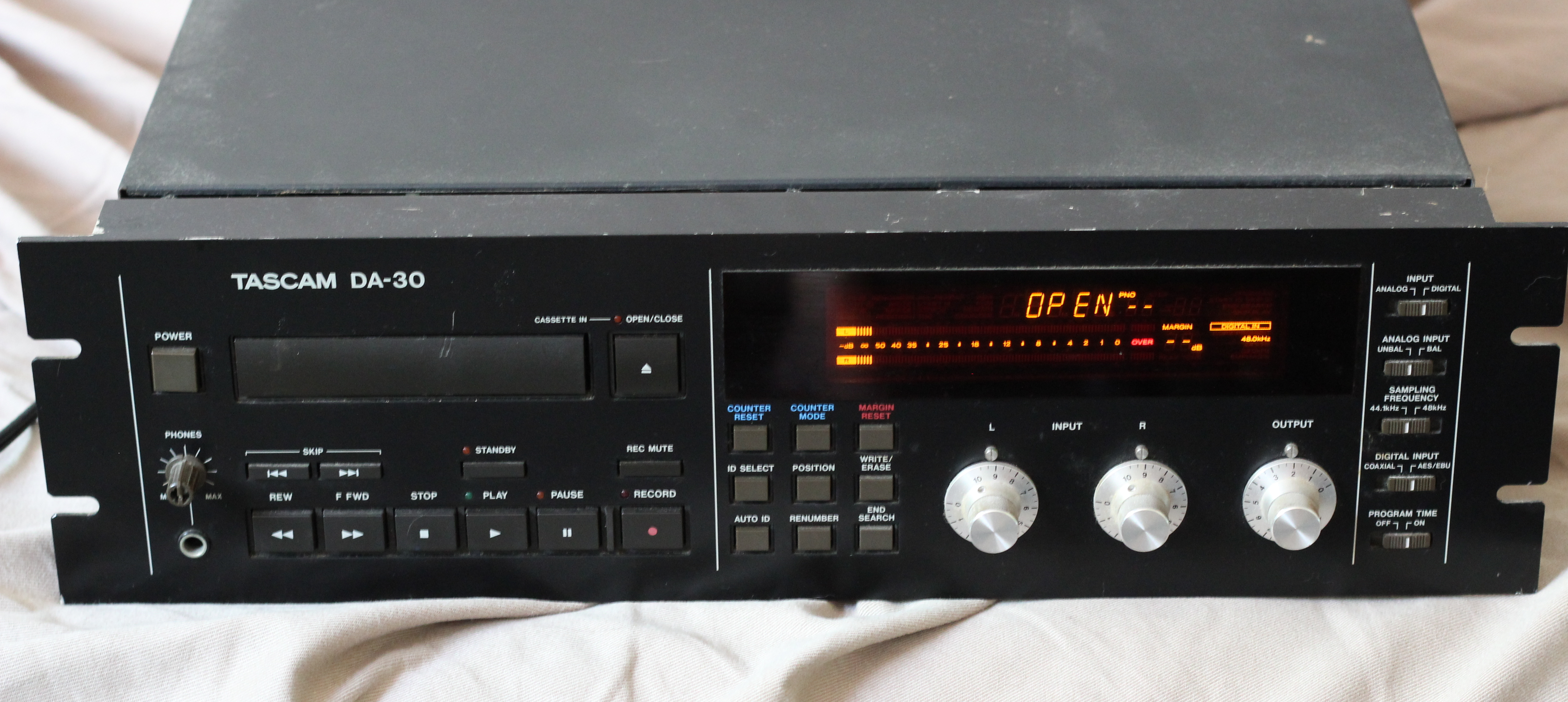 Tascam DA-30 DAT Recorder